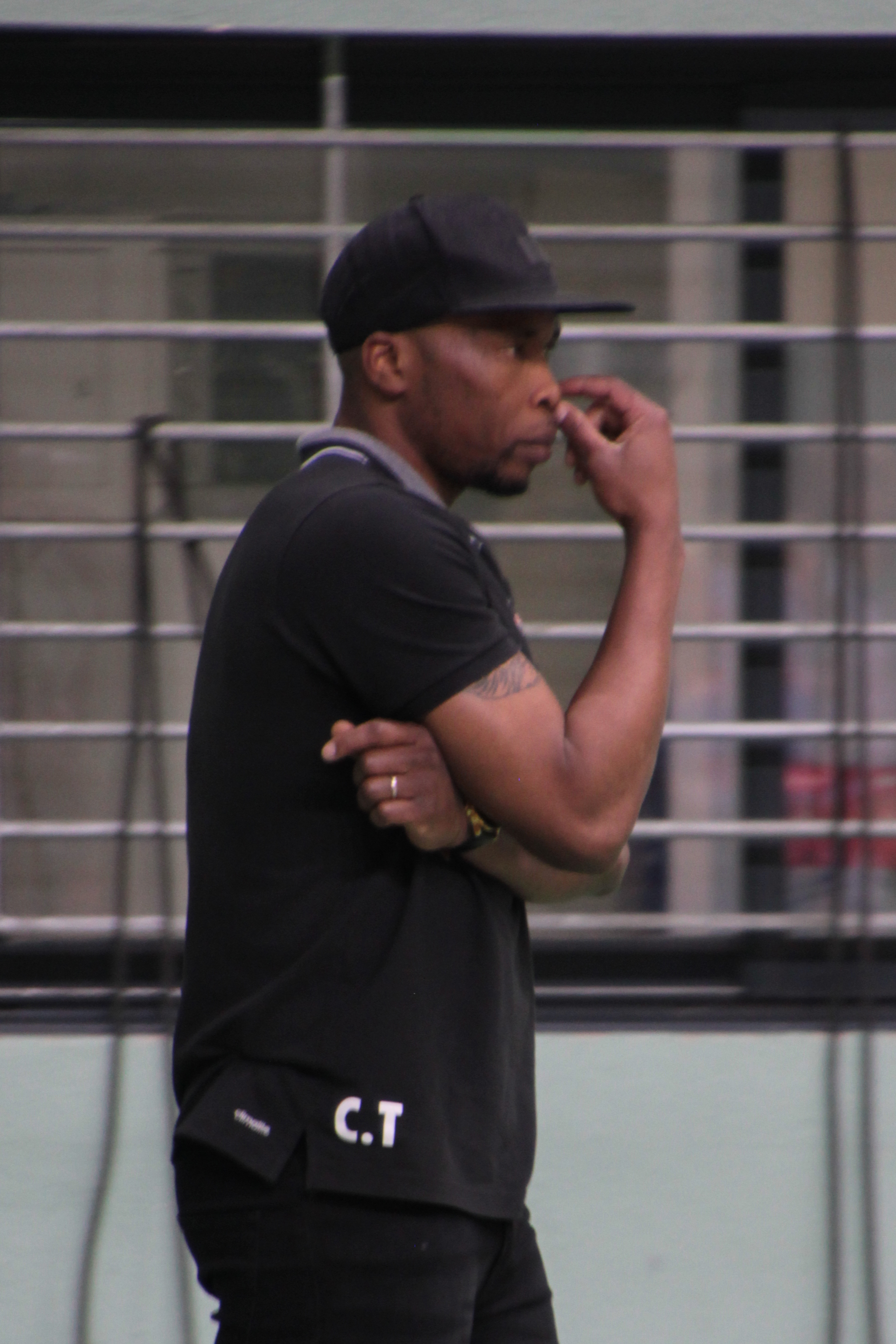 Le joueur et entraîneur franco-camerounais de volley-ball Constant Tchouassi, sous le maillot du Mende Volley Lozère en avril 2017